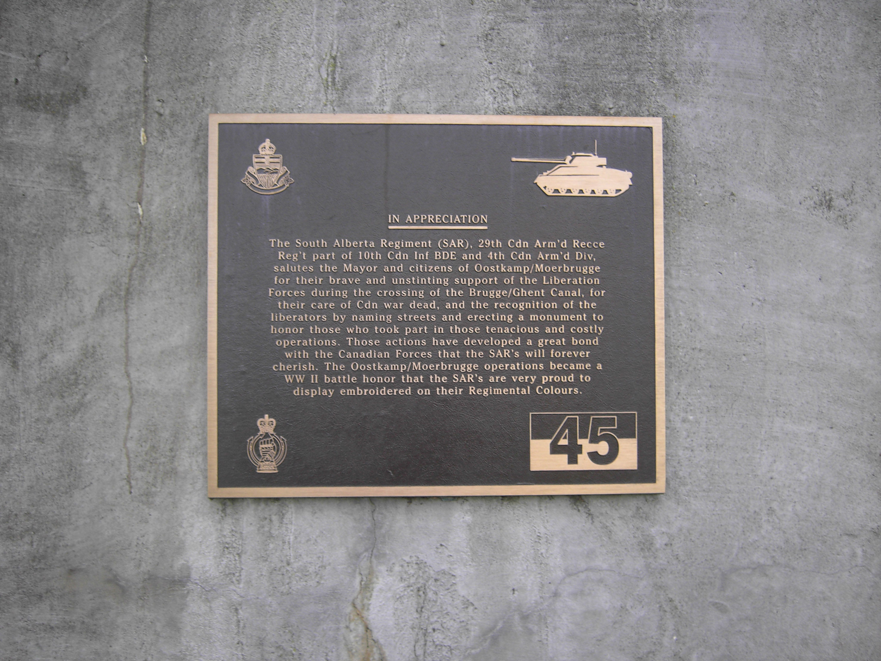 Moerbrugge - Oostkamp - Belgium - Bordje aan monument Canadezen.